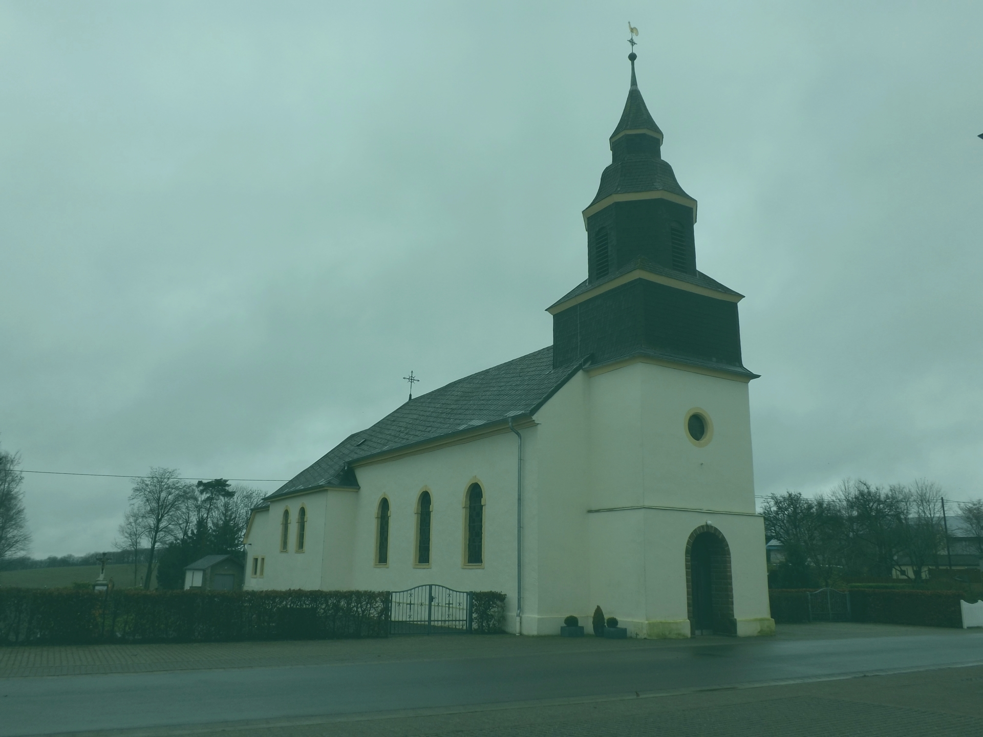 Kirche St Cosmas und Damian Ausenansicht